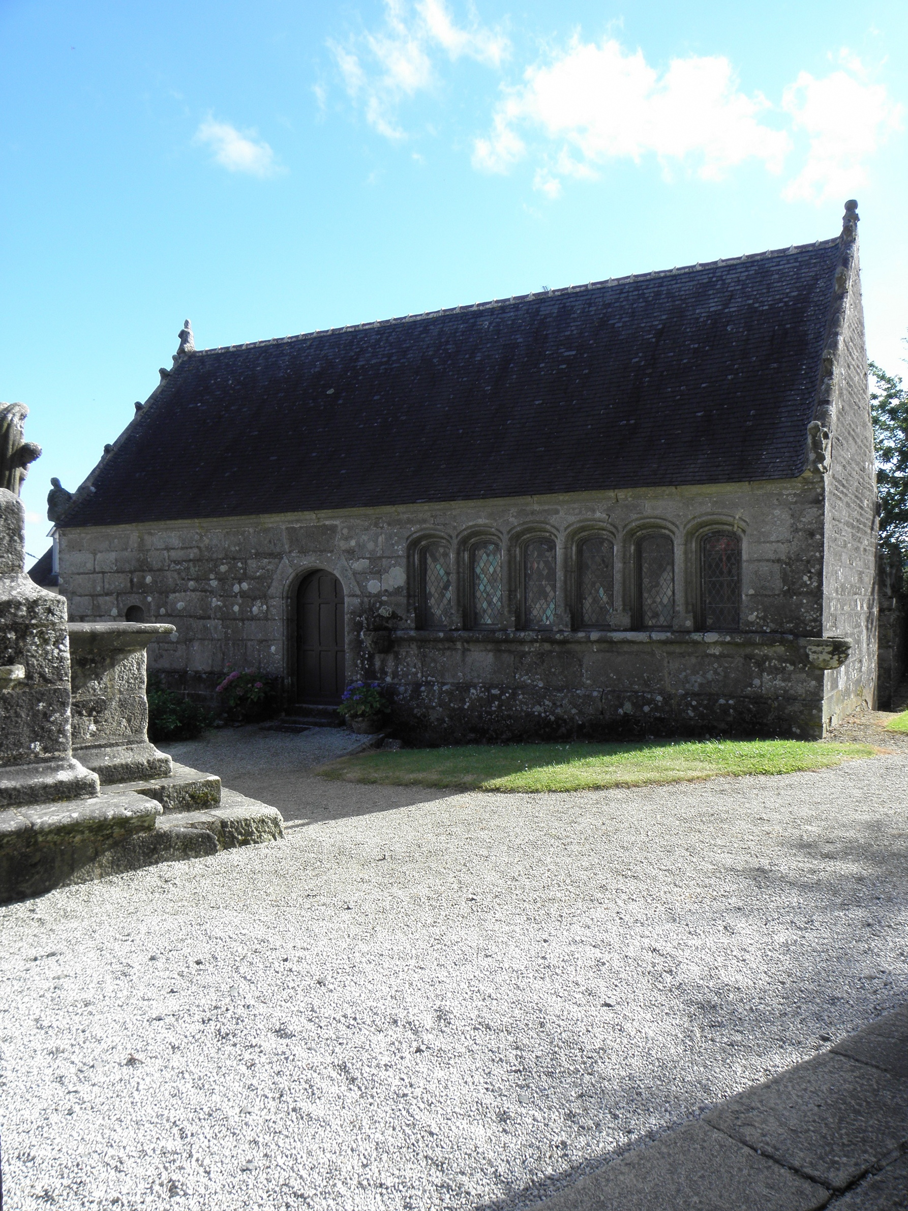 Ossuaire de l'enclos paroissial de Brasparts (29). .